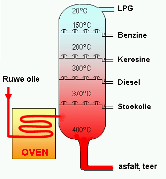 Destillatietoren voor ruwe olie